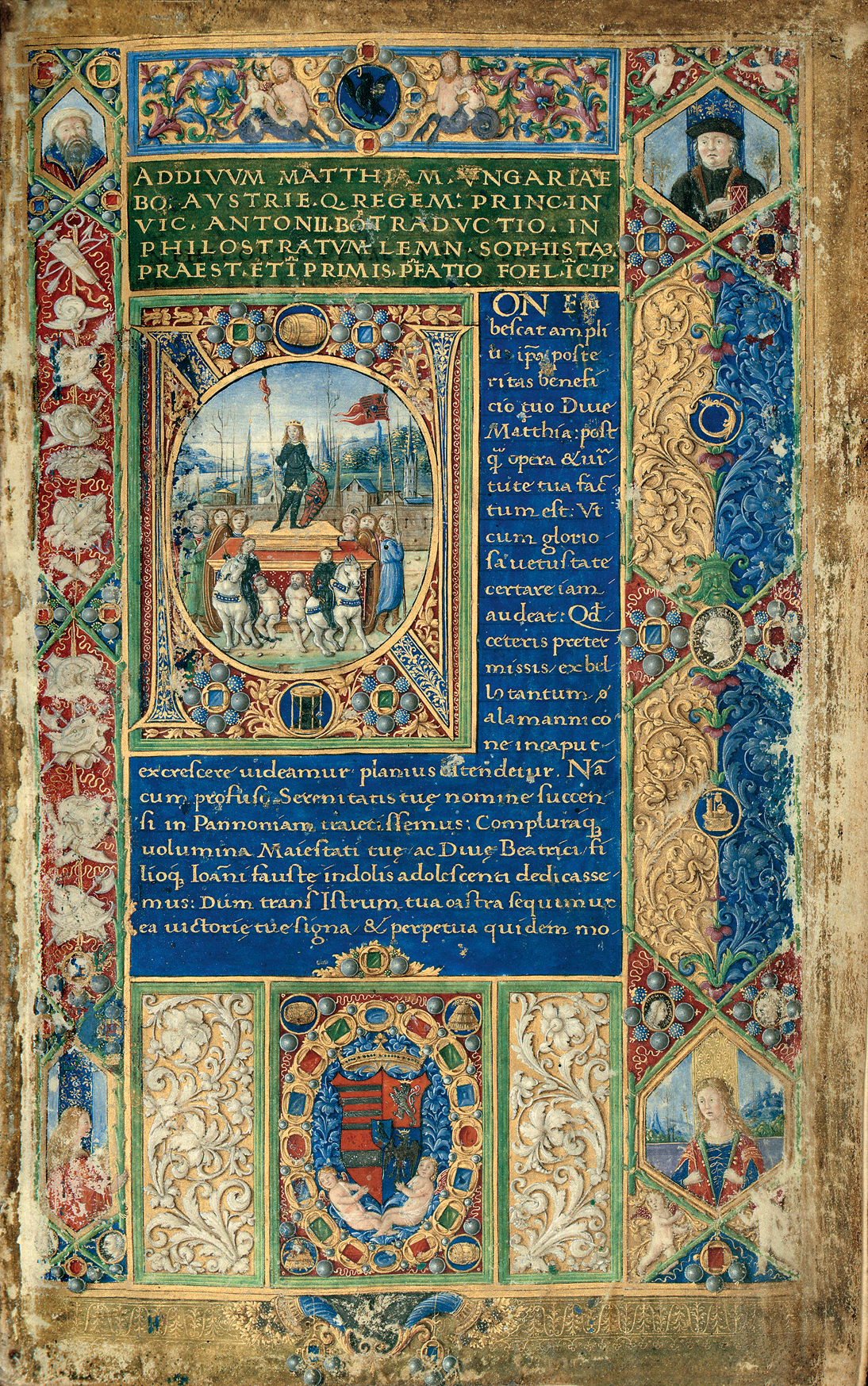 Mátyás bevonulása Bécsbe, Philostratus kódex, Bibliotheca Corviniana. Feltételezés szerint a diadalmenetet tartó személy Corvin János